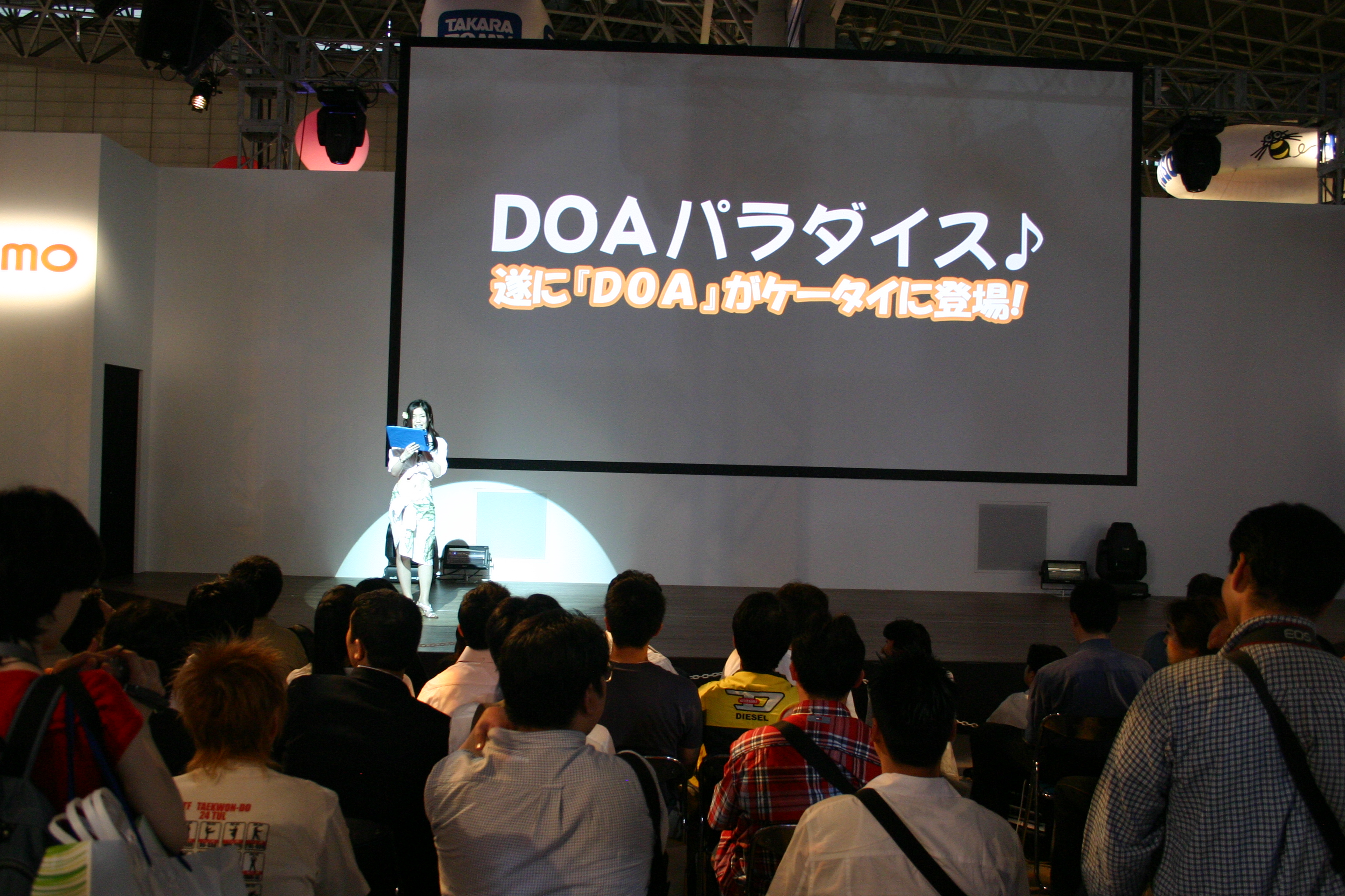 2006東京電玩展，特庫摩攤位展示《生死格鬥系列》的手機遊戲《DOA樂園♪》（DOAパラダイス♪）。